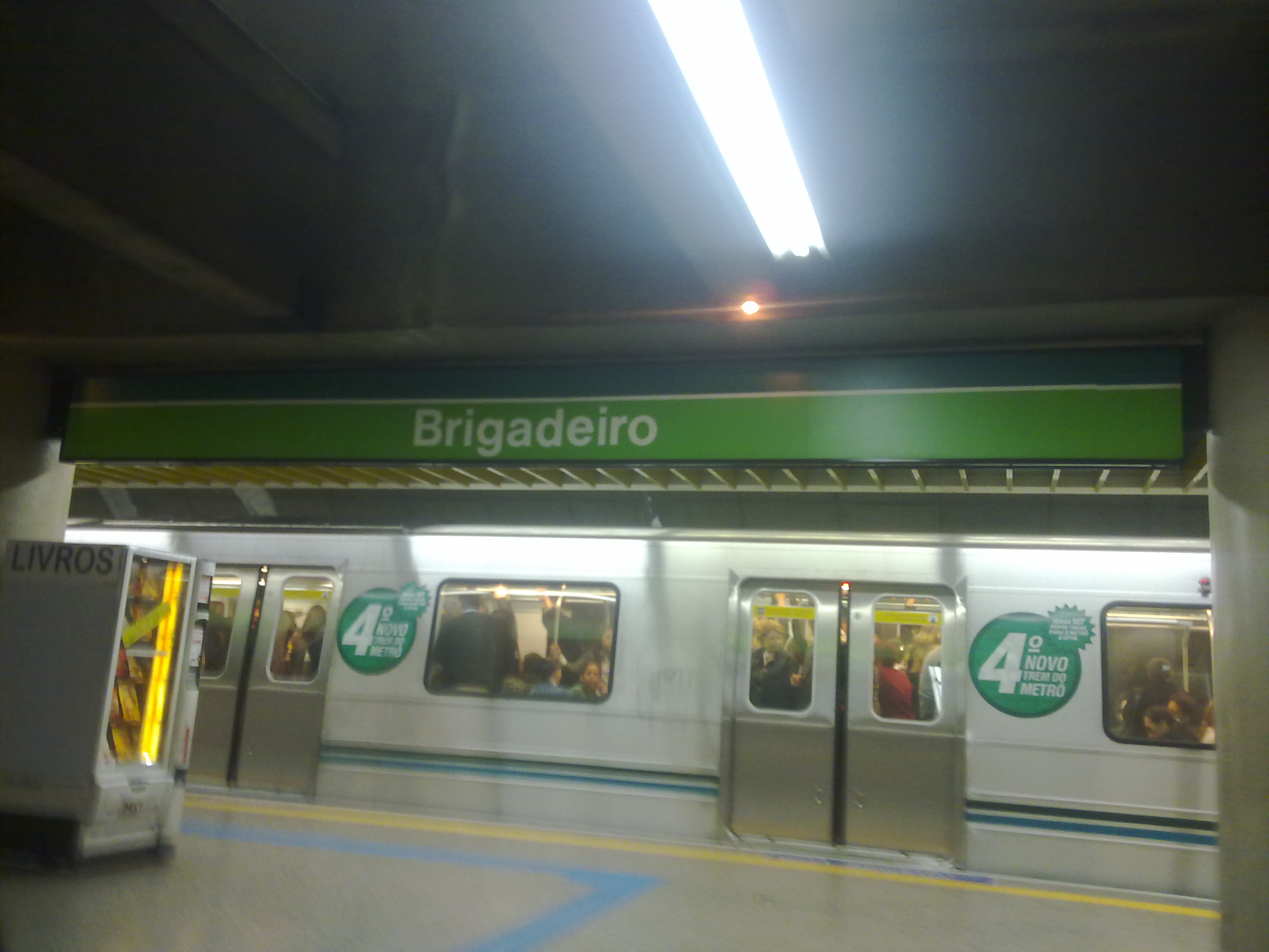 Foto da estação Brigadeiro do Metrô de São Paulo, Brasil